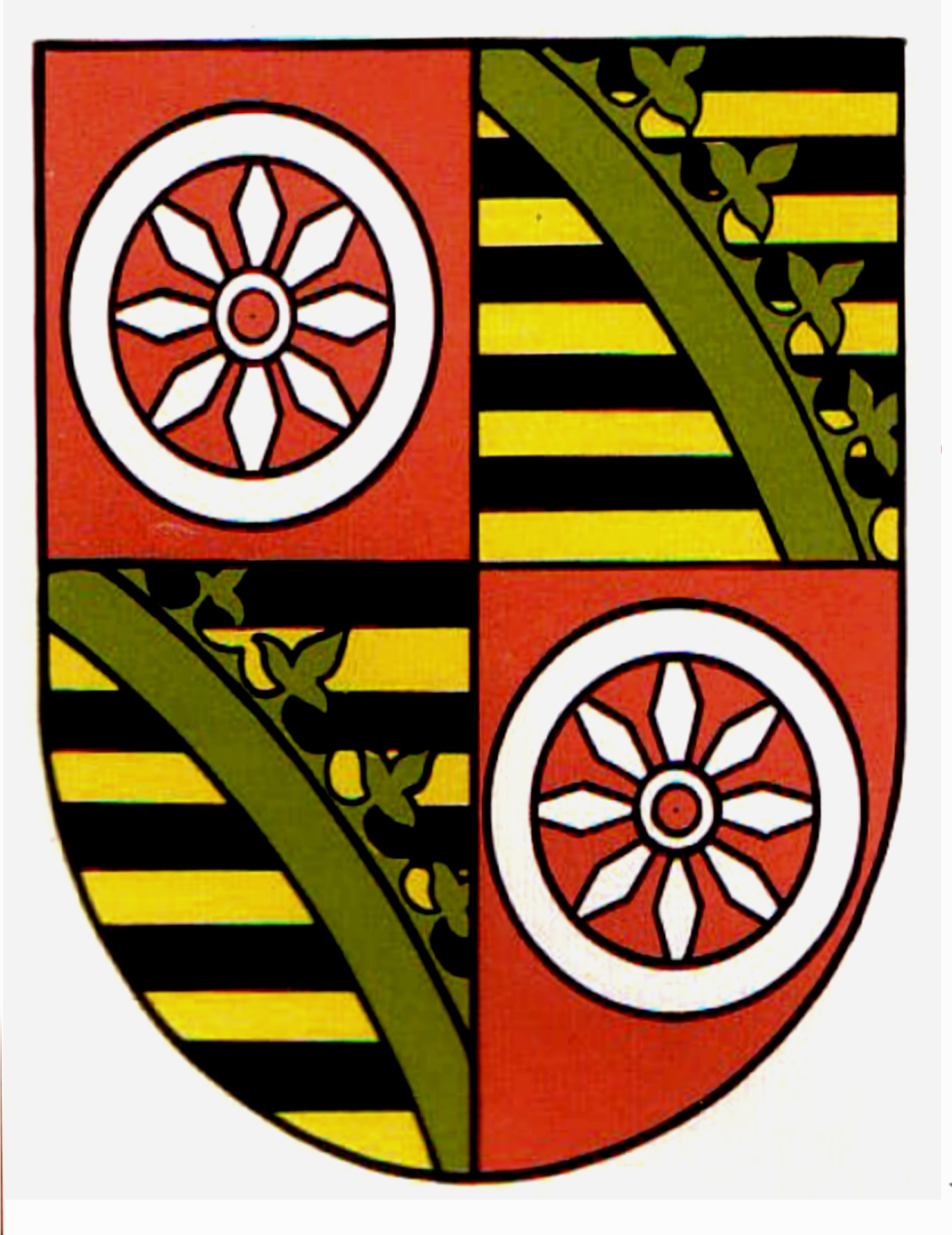 Adalbert III. von Sachsen, Administrator des Erzbistums Mainz 14982-1484